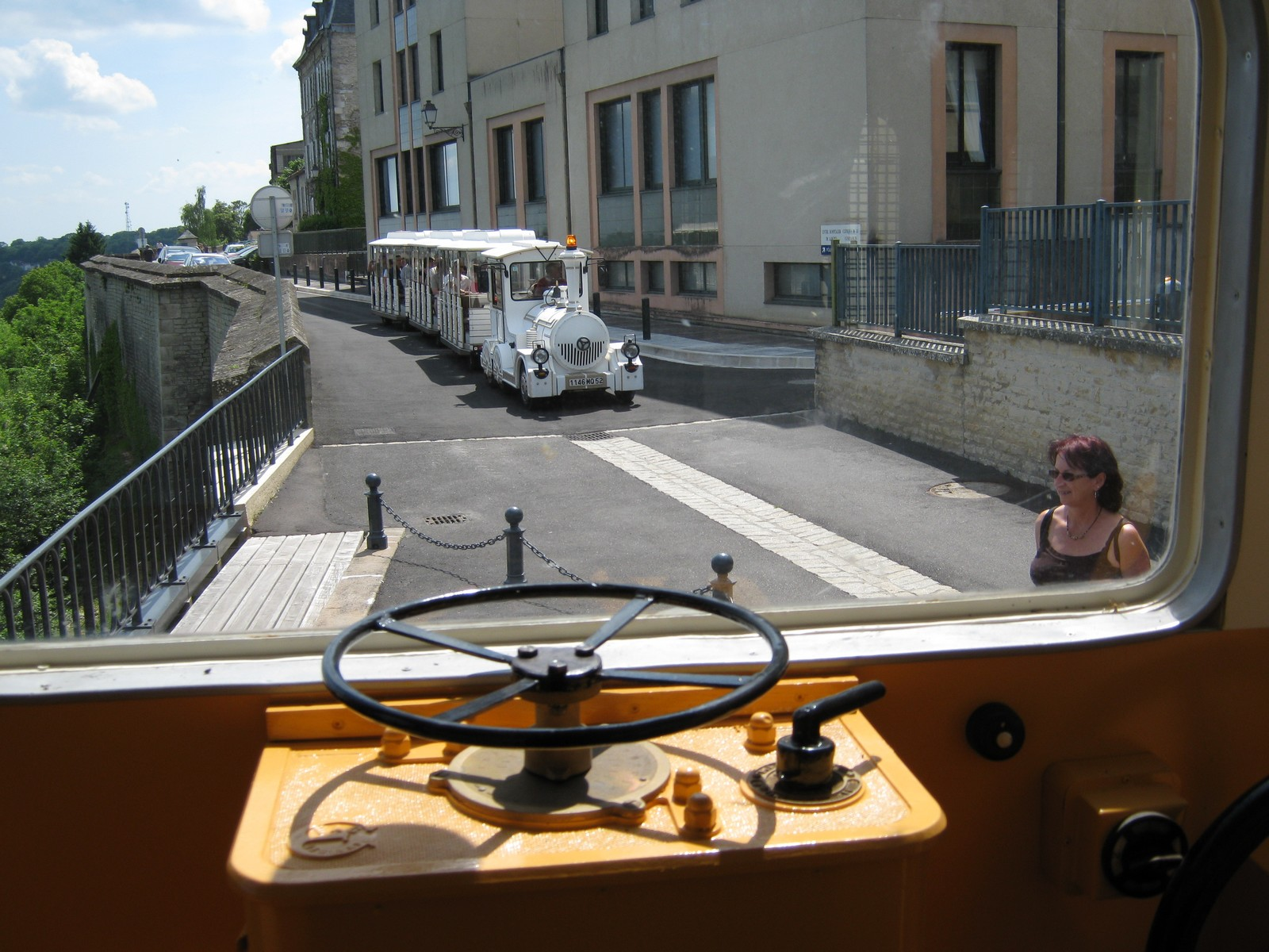 Cremaillere Poste de conduite